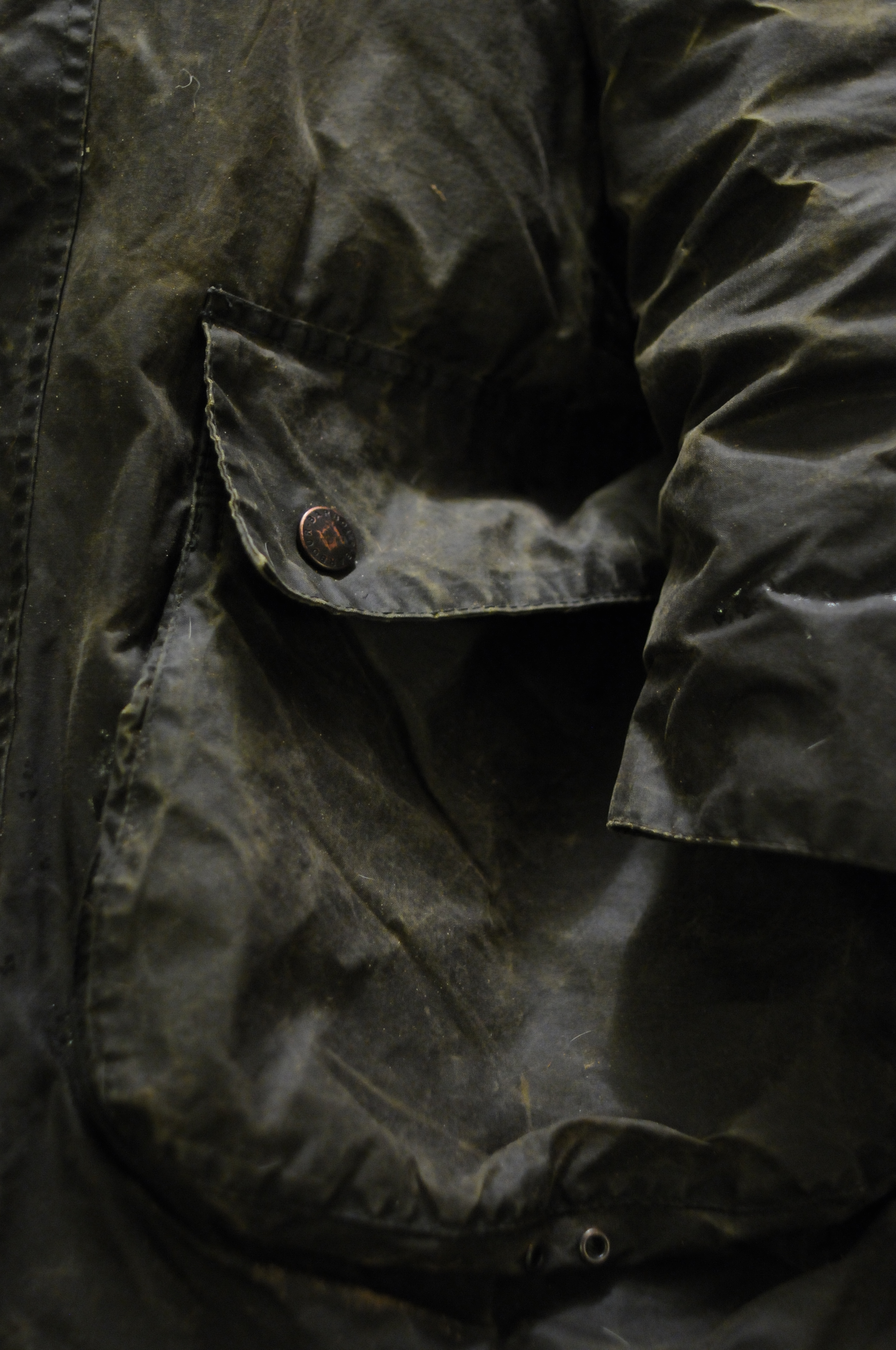 Barbour jacket.